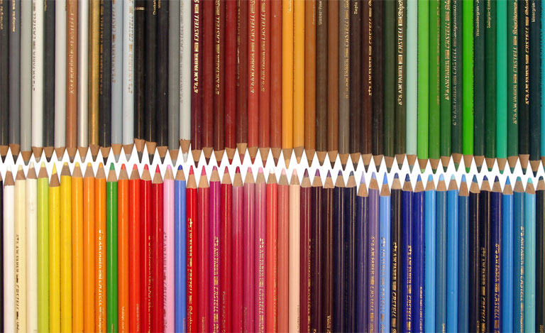 GNU-FDL, selbst fotografiert